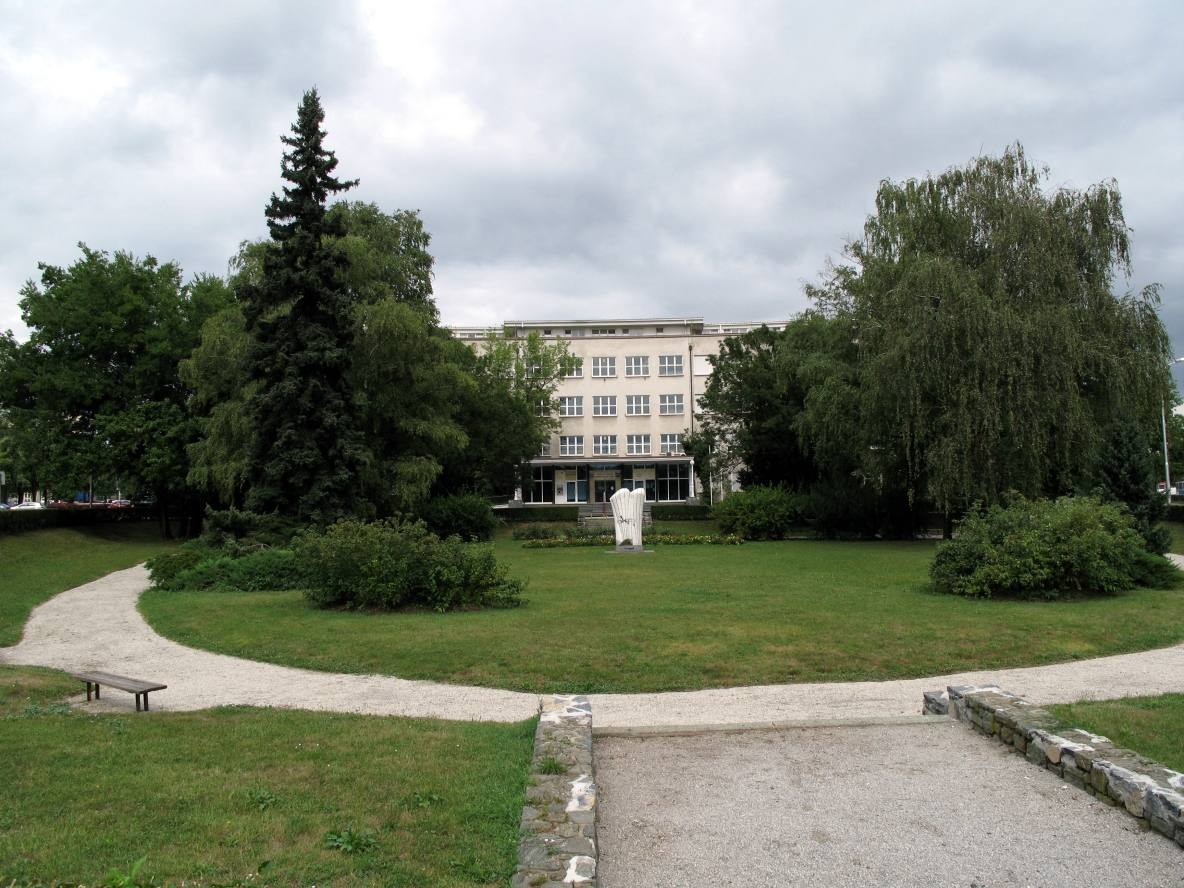 Ekonomski fakultet u Zagrebu